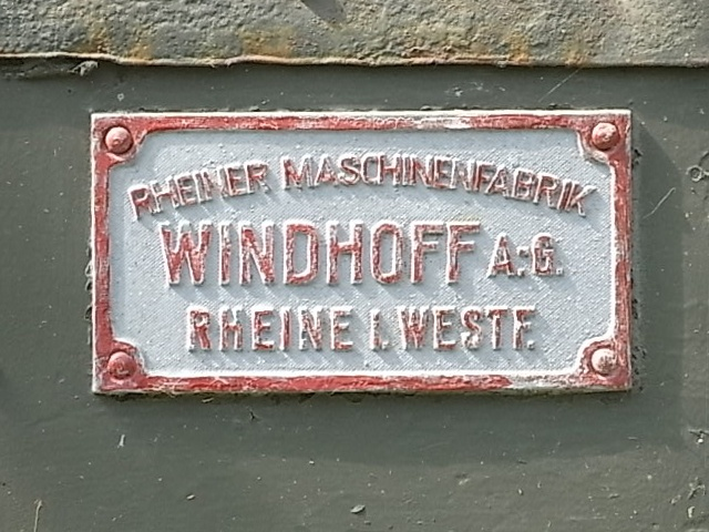 Firmenschild auf einer Feldbahnlok in der Festung Marghera (Venedig).